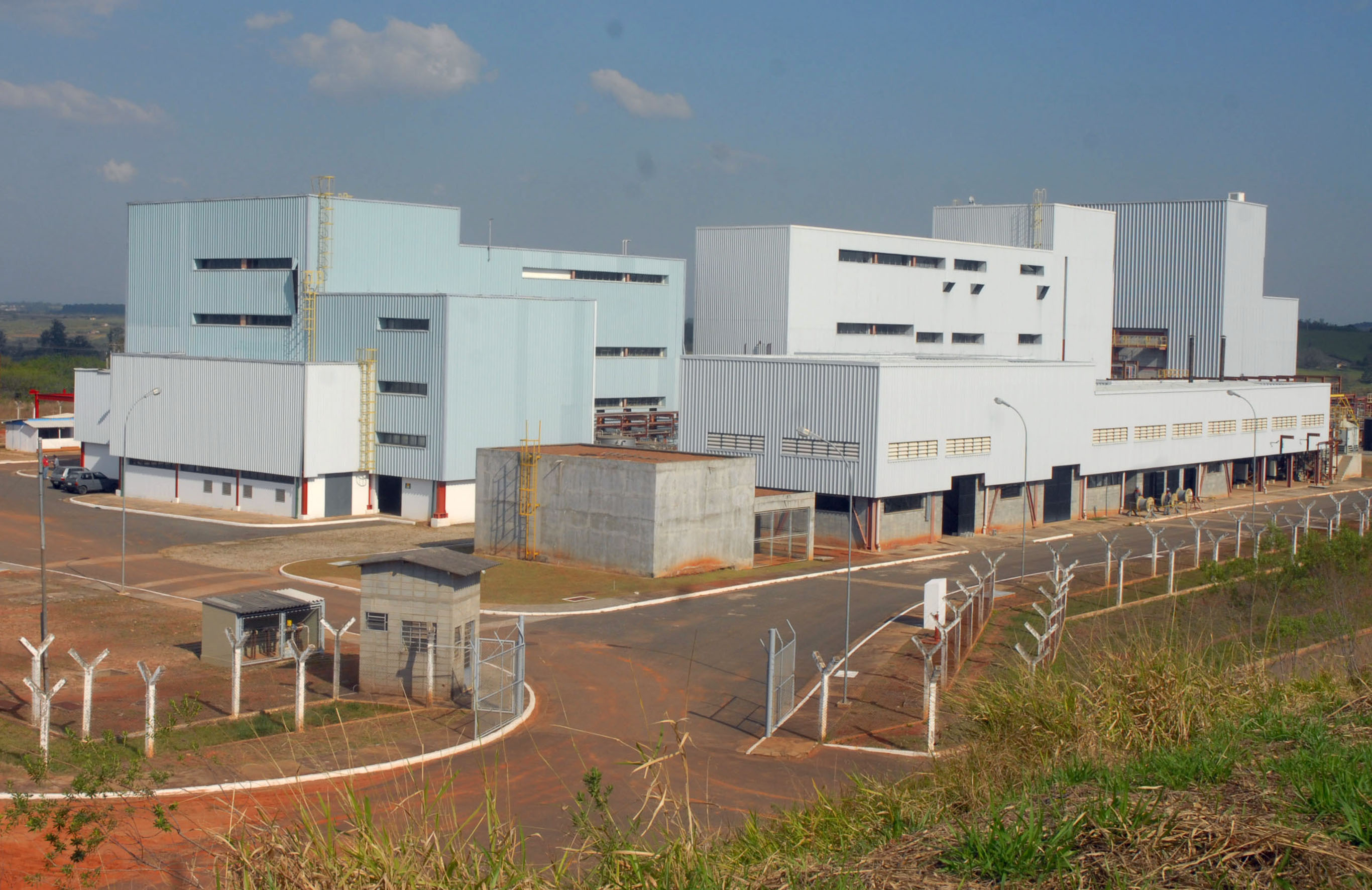 Instalações da Usina de Hexafluoreto de Urânio (Usexa), onde a Marinha passará a realizar uma das duas etapas do processo de produção do combustível nuclear em que o Brasil ainda é dependente de outros países, a conversão do urânio em pó em gás.